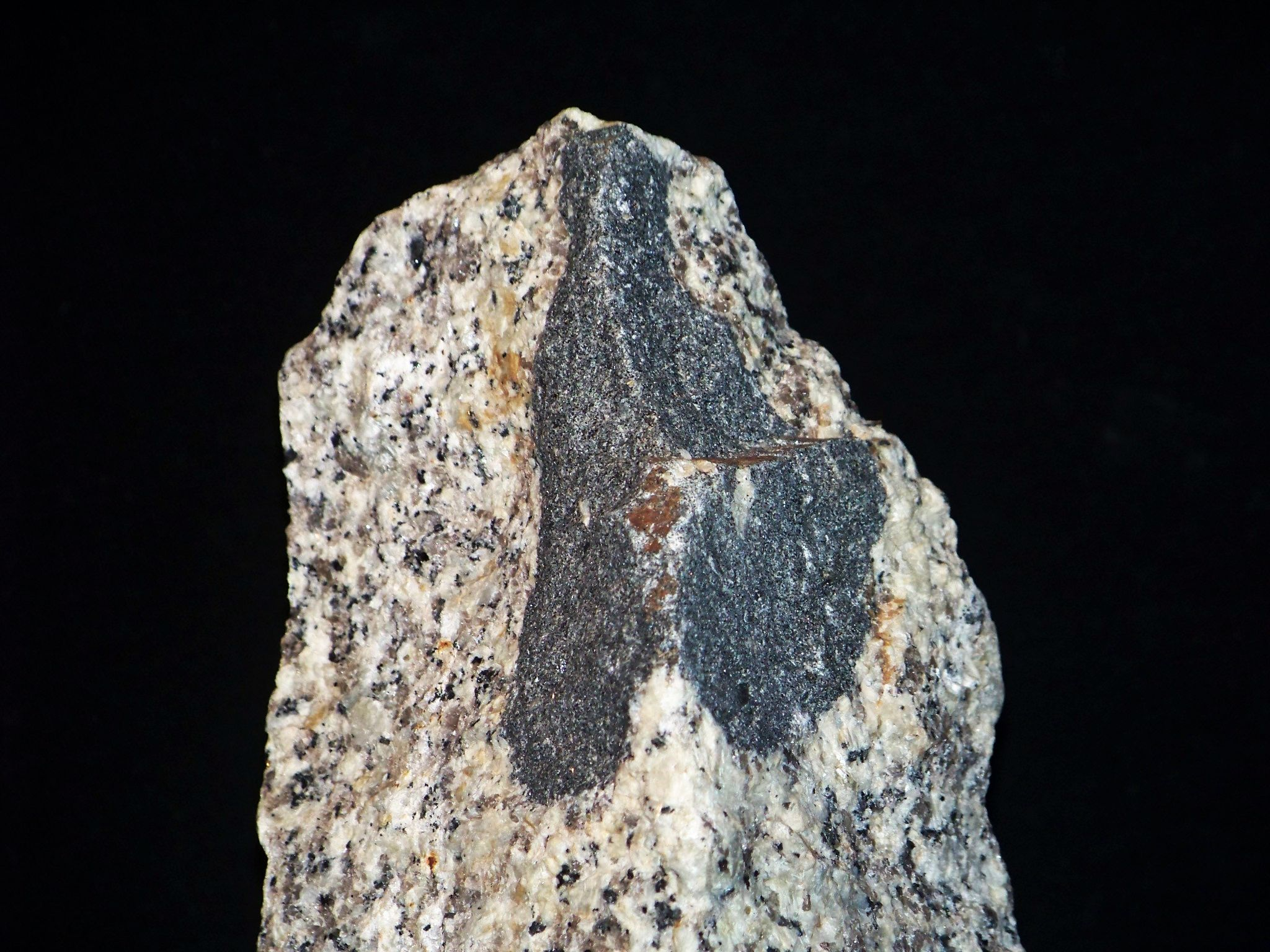 Ksenolit maficzny w granitoidzie